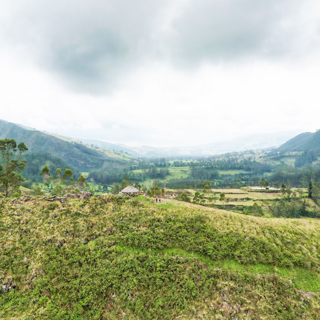 La parroquia de Angochagua es una de las más antiguas quizá de toda la provincia. No existe documento acerca de su historia. Por la tradición oral se sabe que la comunidad fue formada por los indígenas llamados Pedro, José y Miguel Angochagua. Los tres mencionados hermanos fueron los fundadores; pero de ellos no existen descendientes que se extinguieron hace 250 años.